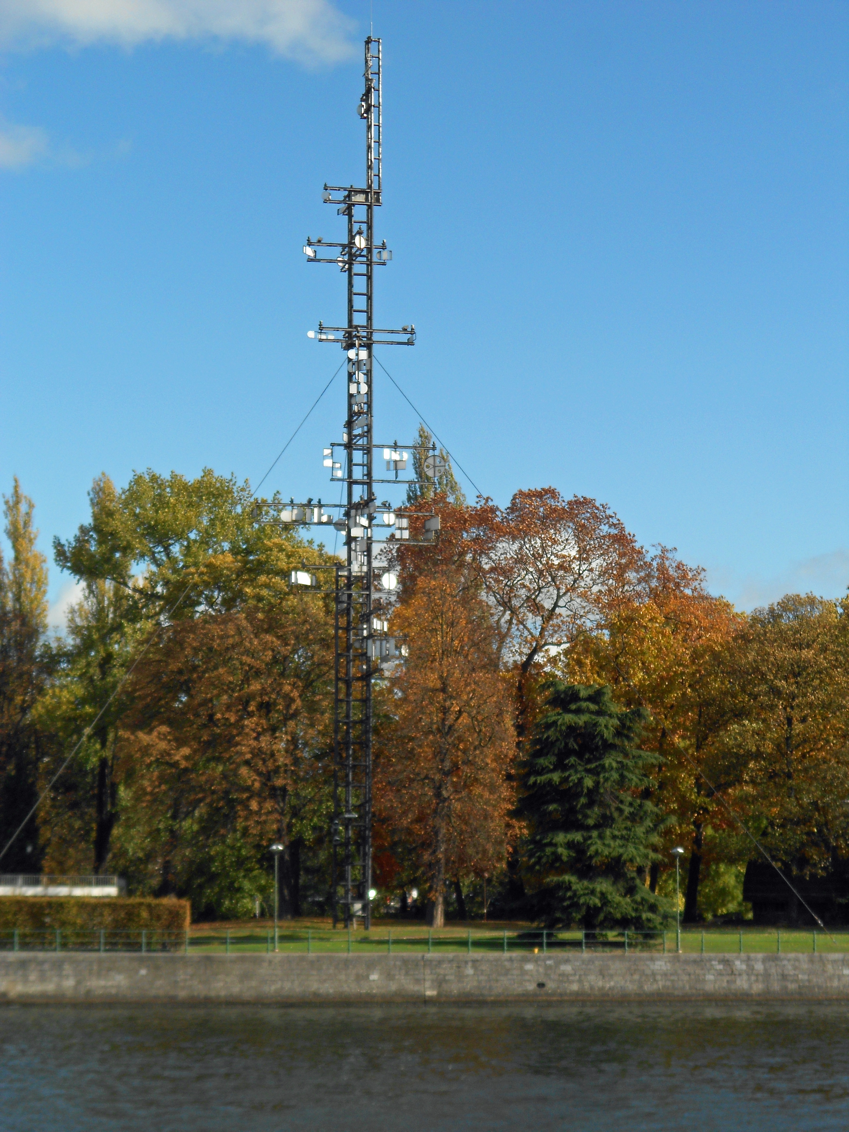 Tour cybernétique de Nicolas Schöffer - L'ensemble de la Tour et les composantes matérielles ayant permis la réalisation du programme aléatoire et le spectacle luminodynamique Formes et lumières